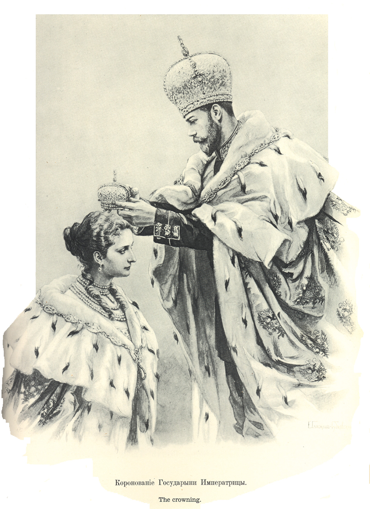 Коронационный сборник, коронация 1896 года.